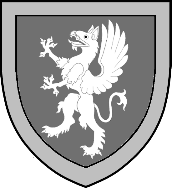 Vapensköld för den medeltida norska Bjarkøyätten